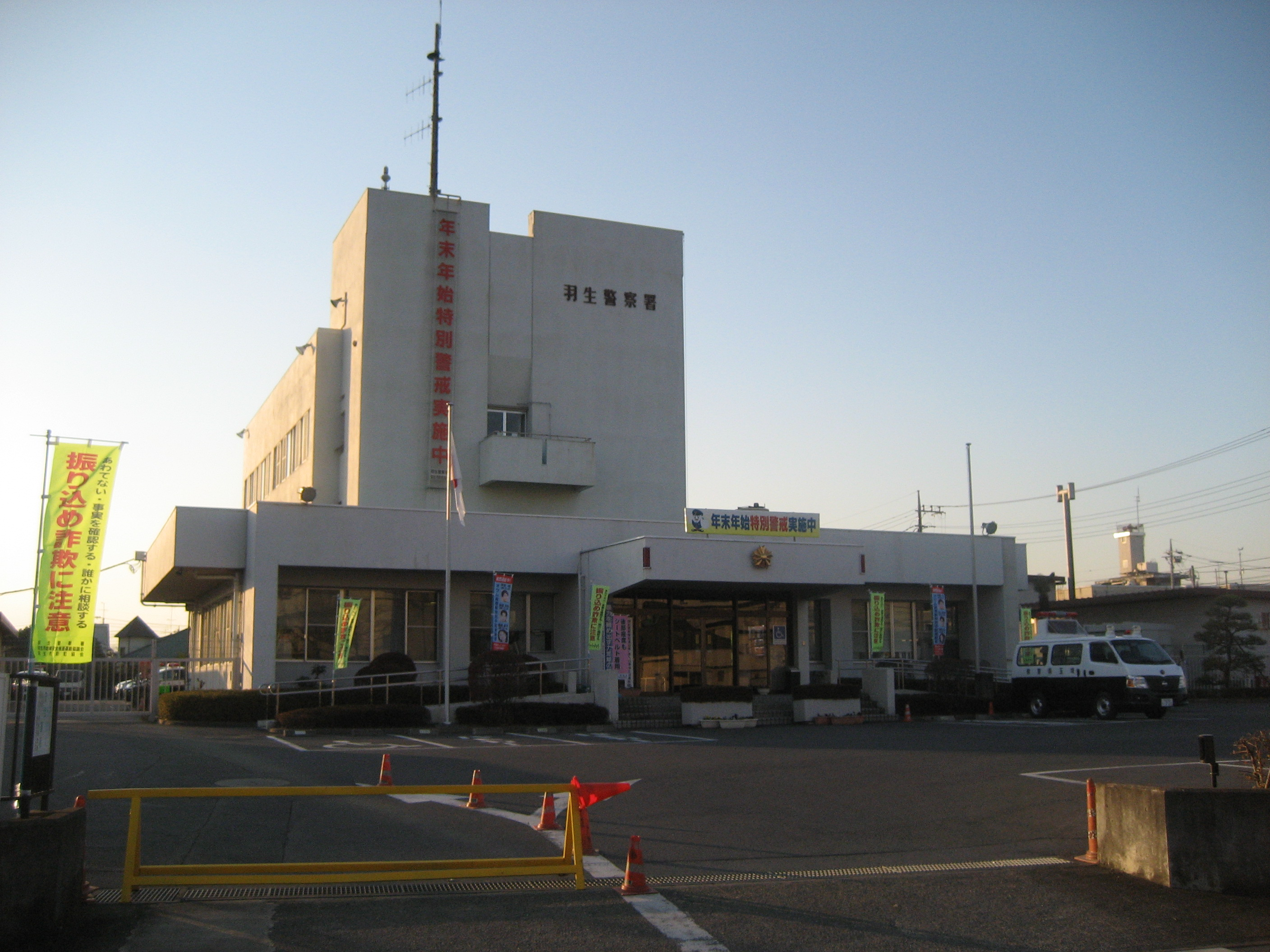 埼玉県羽生警察署庁舎